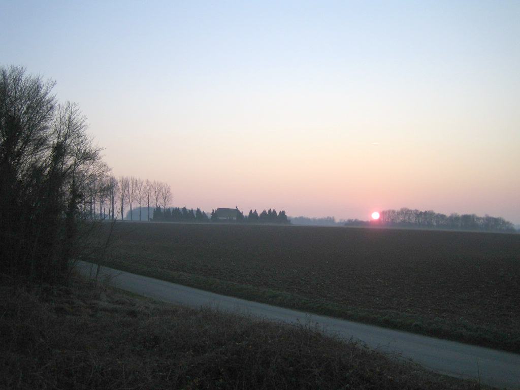 Bovelles (Somme, France) - Le cimetière et la chapelle au coucher de soleil (vue depuis le bas-côté du croisement de la route menant à Picquigny et du Chemin des Charbonniers). . .